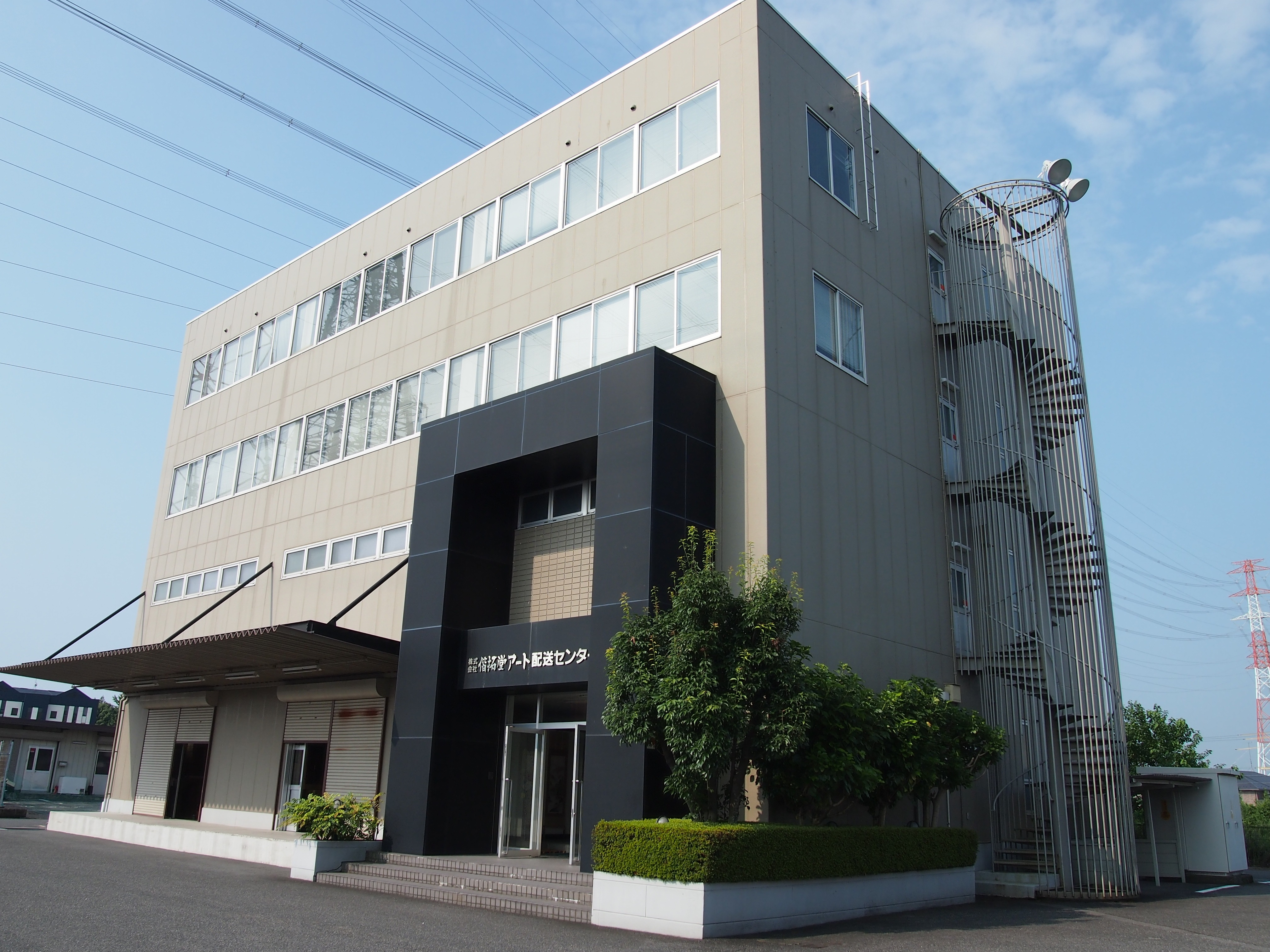 偕拓堂アート＿会社外観